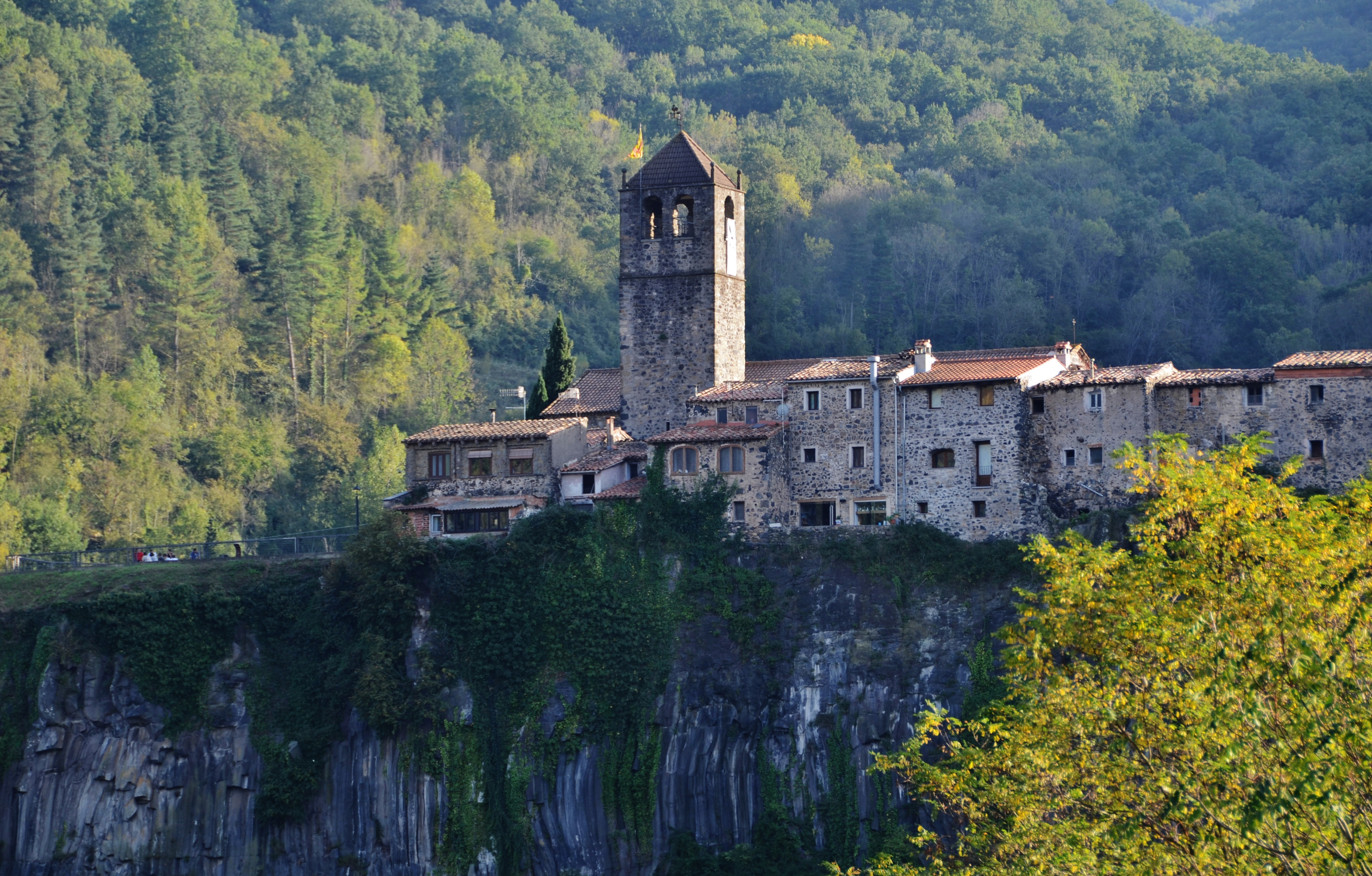 Geozona Castellfollit de la Roca This is a a photo of a geologic site or geotope in Catalonia, Spain, with id: IEIGC-208